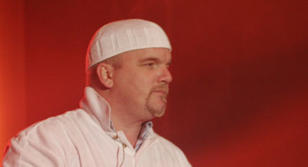 Bildbeschreibung: DJ Ötzi Quelle: Selbst fotografiert während eines Konzerts im Rahmen des Friedberger Vorsilvesters Fotograf/Zeichner: Ohtar Datum: 30.12.2005